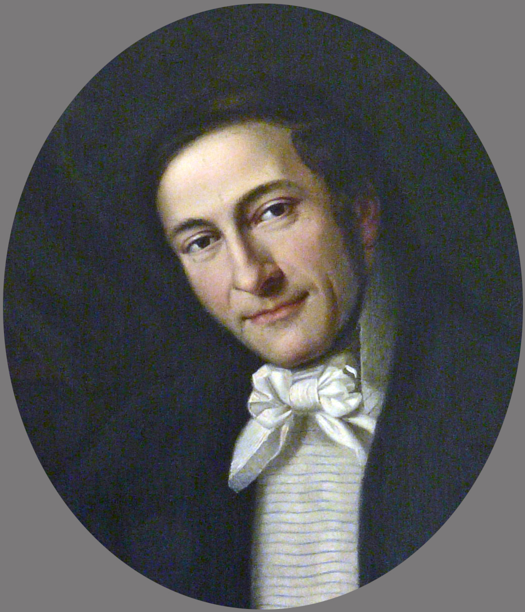 Heinrich Lachmann (1797–1872), Ausschnitt aus dem Gemälde von C. Moritz aus dem Jahr 1837 komplettes Gemälde